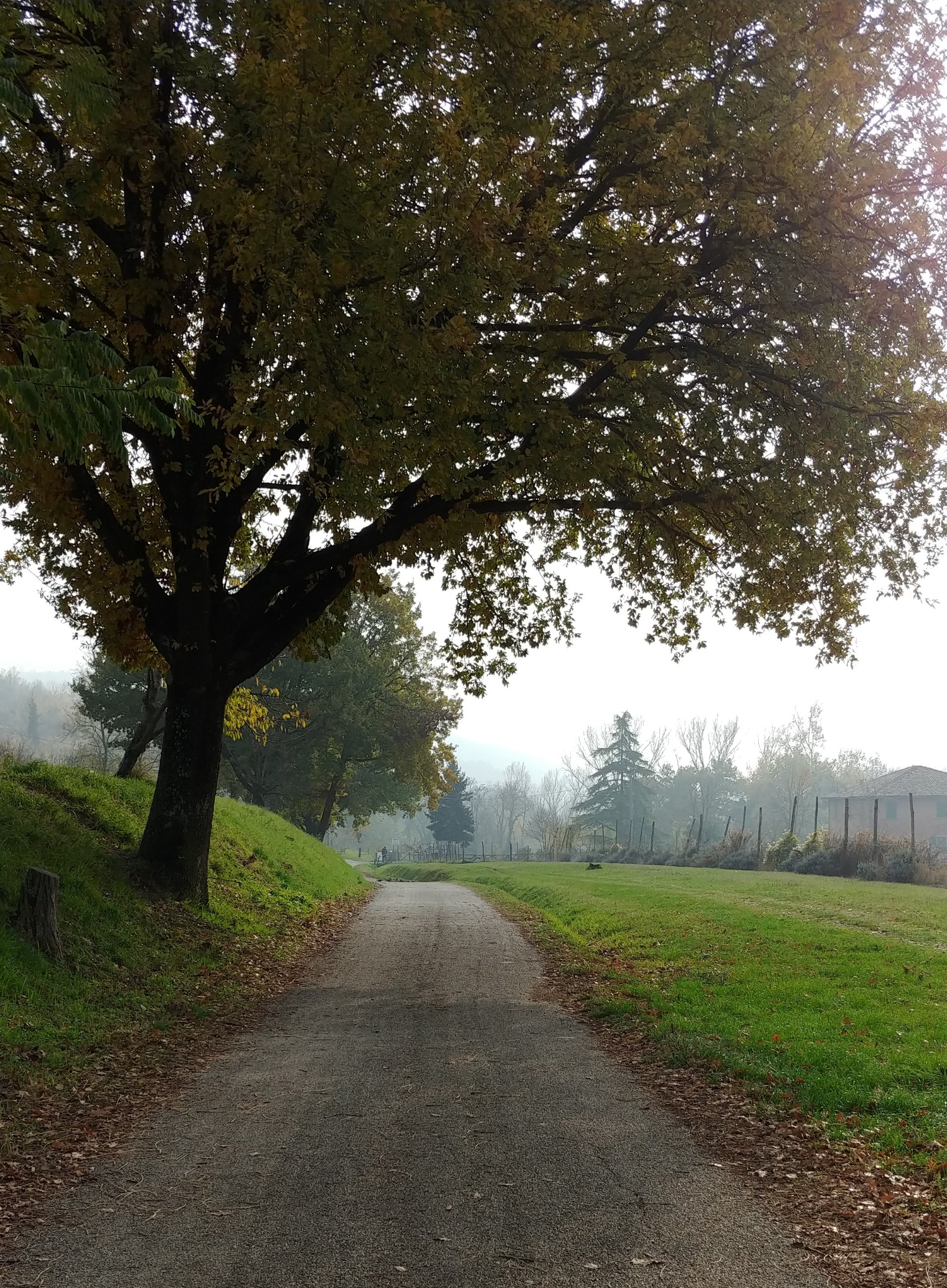 Sentiero Parco Talon